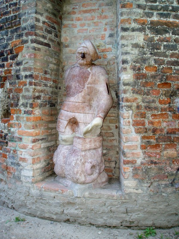 Das Denkmal "Stoinerner Ma" ("Steinerner Mann") an der Augsburger Stadtmauer. Sonstiges: Freie Lizenz erteilt.